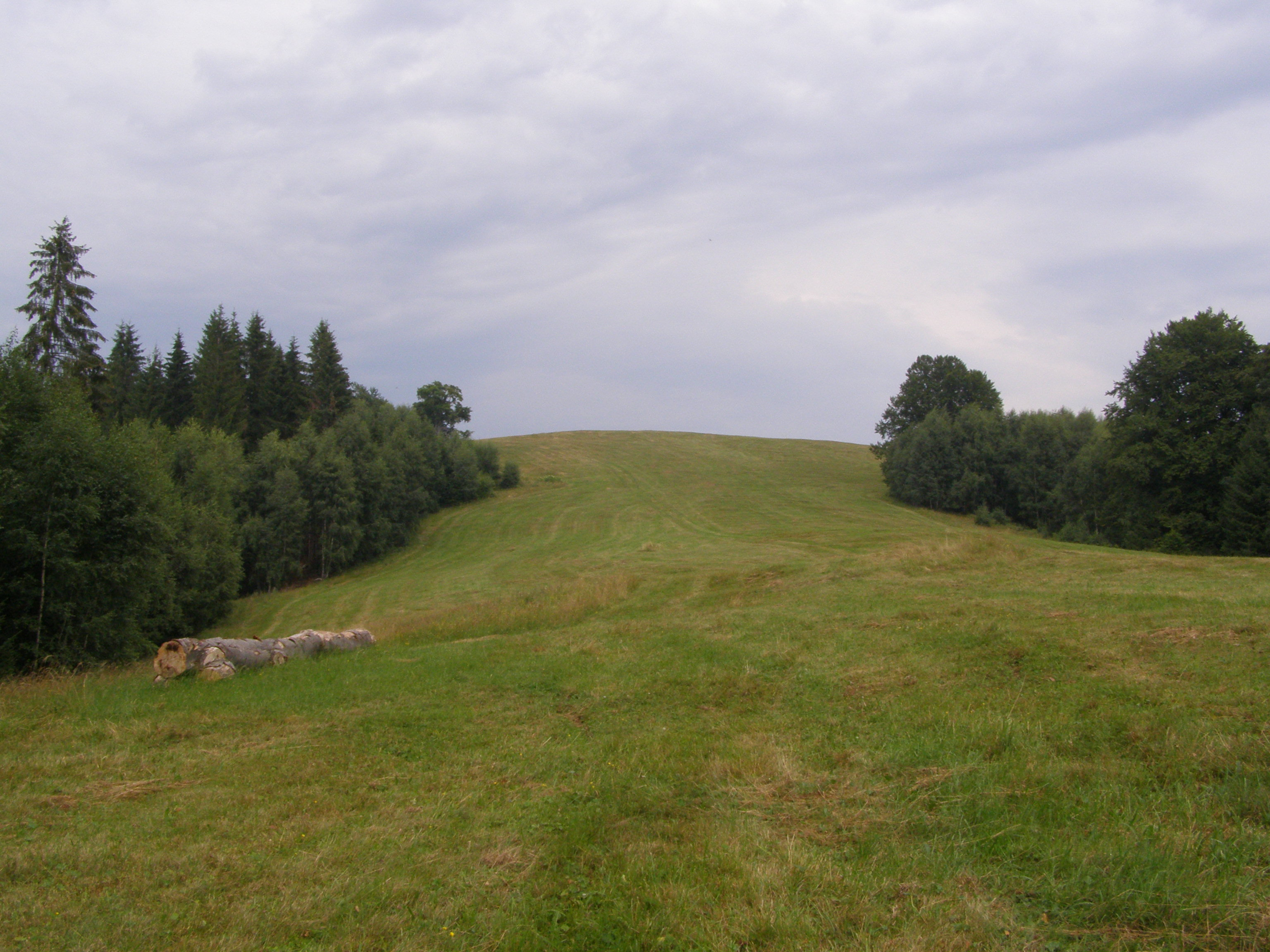 Slovenské rudohoří, Veporské vrchy, Balocké vrchy, jihozápadní úbočí vrcholu Zákľuky (1012 m)